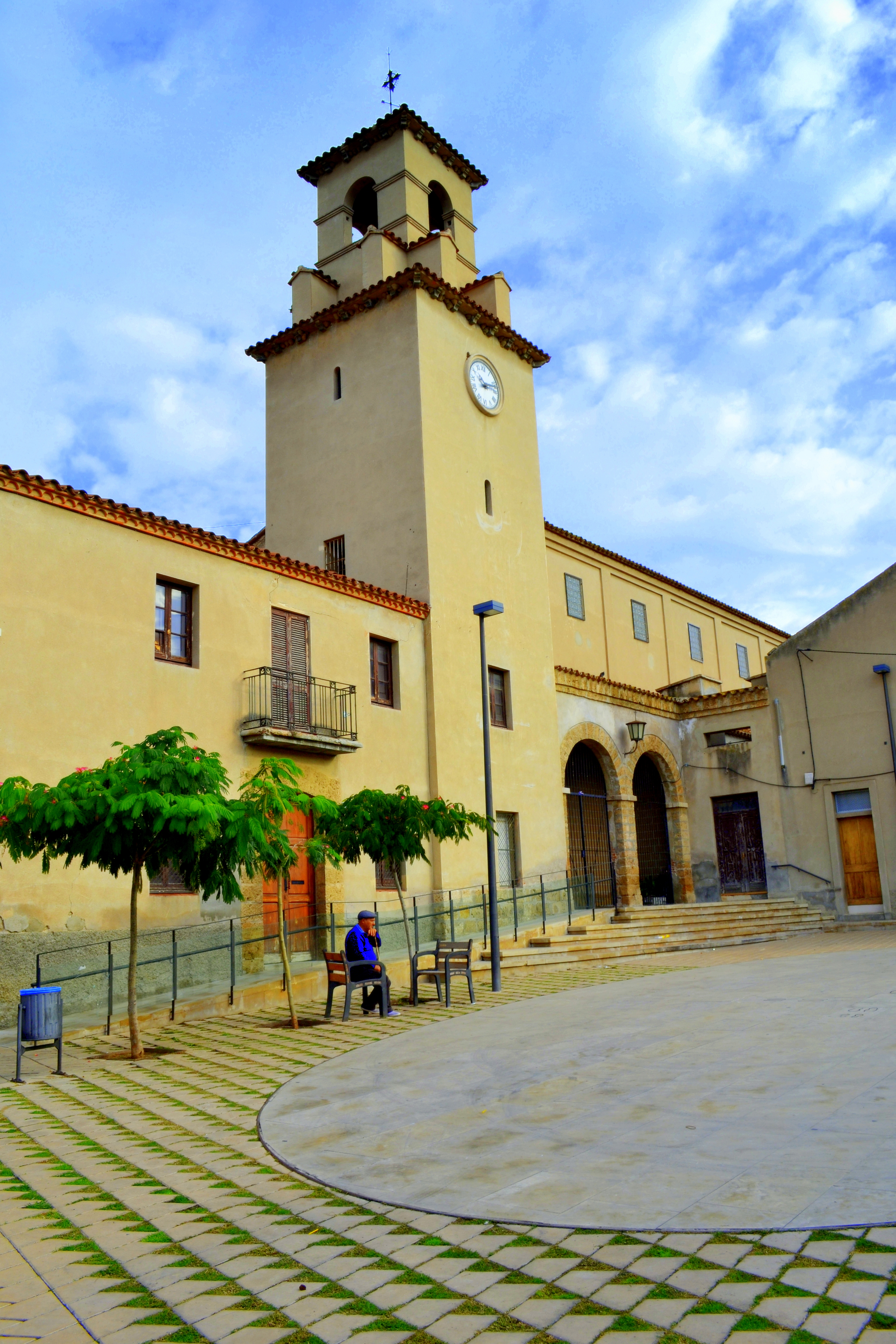 Església parroquial de Sant Bartomeu (Vallbona d'Anoia)